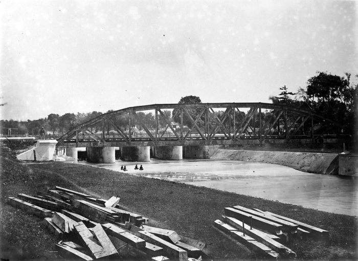 Negatief. Schutsluizen te Wonokromo, Surabaya